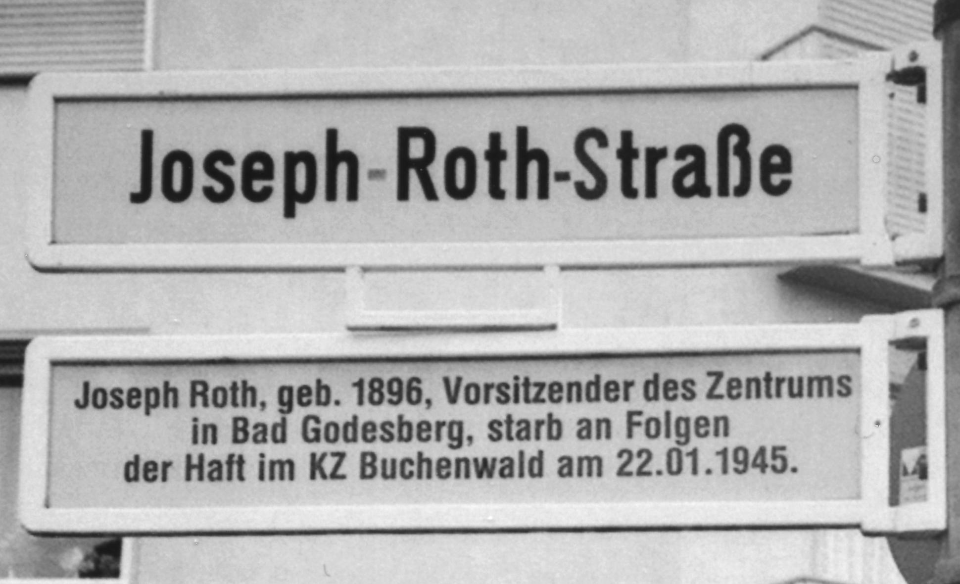 Das Straßenschild Ecke Annaberger Straße zu Joseph-Roth-Straße